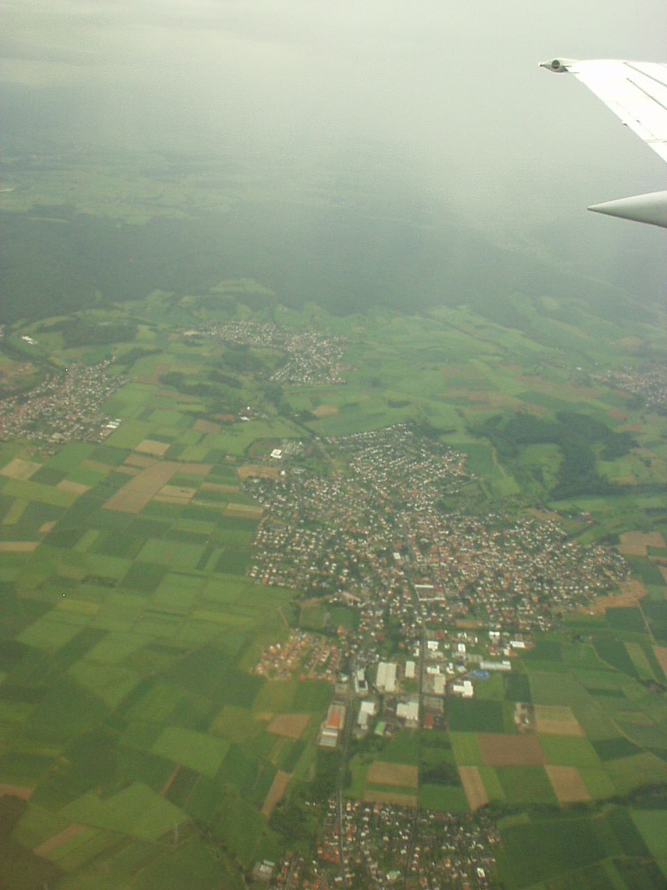 Somborn